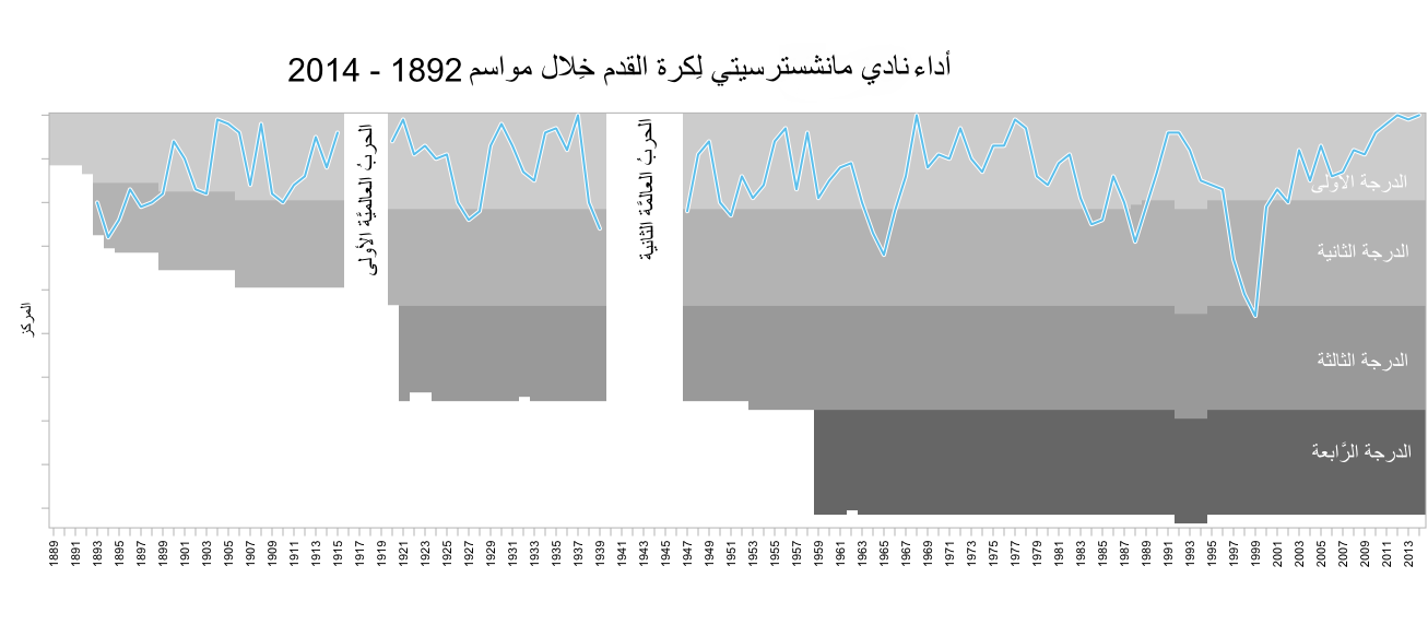 رسمٌ بيانيٌّ يُظهرُ المراكز السنويَّة لِفريق مانشتر سيتي لِكُرة القدم ضمن الدوري الإنگليزي.